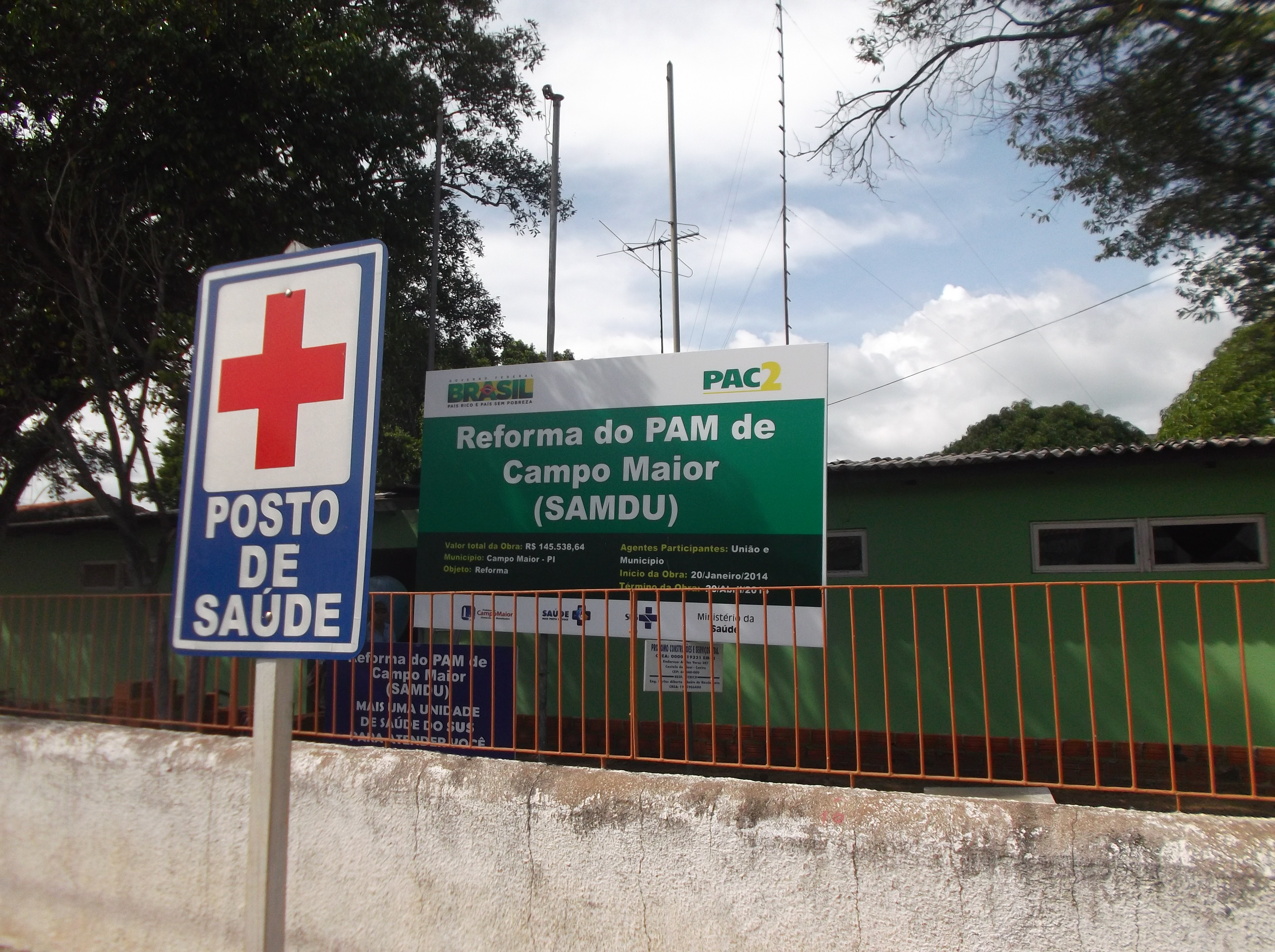 Identificação de obra do Programa de Aceleração do Crescimento PAC 2 em um posto de Saúde.